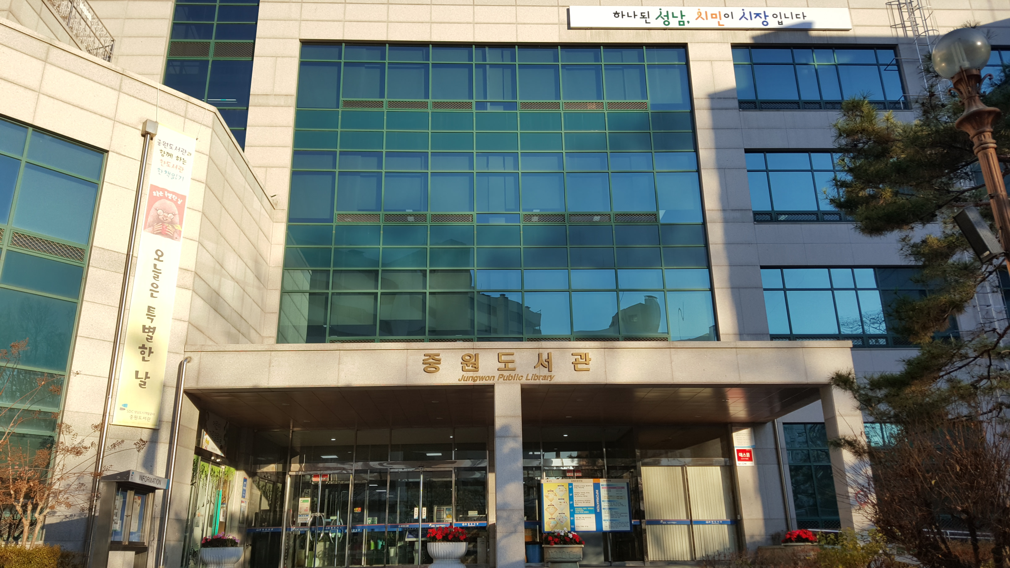 중원도서관 전경사진